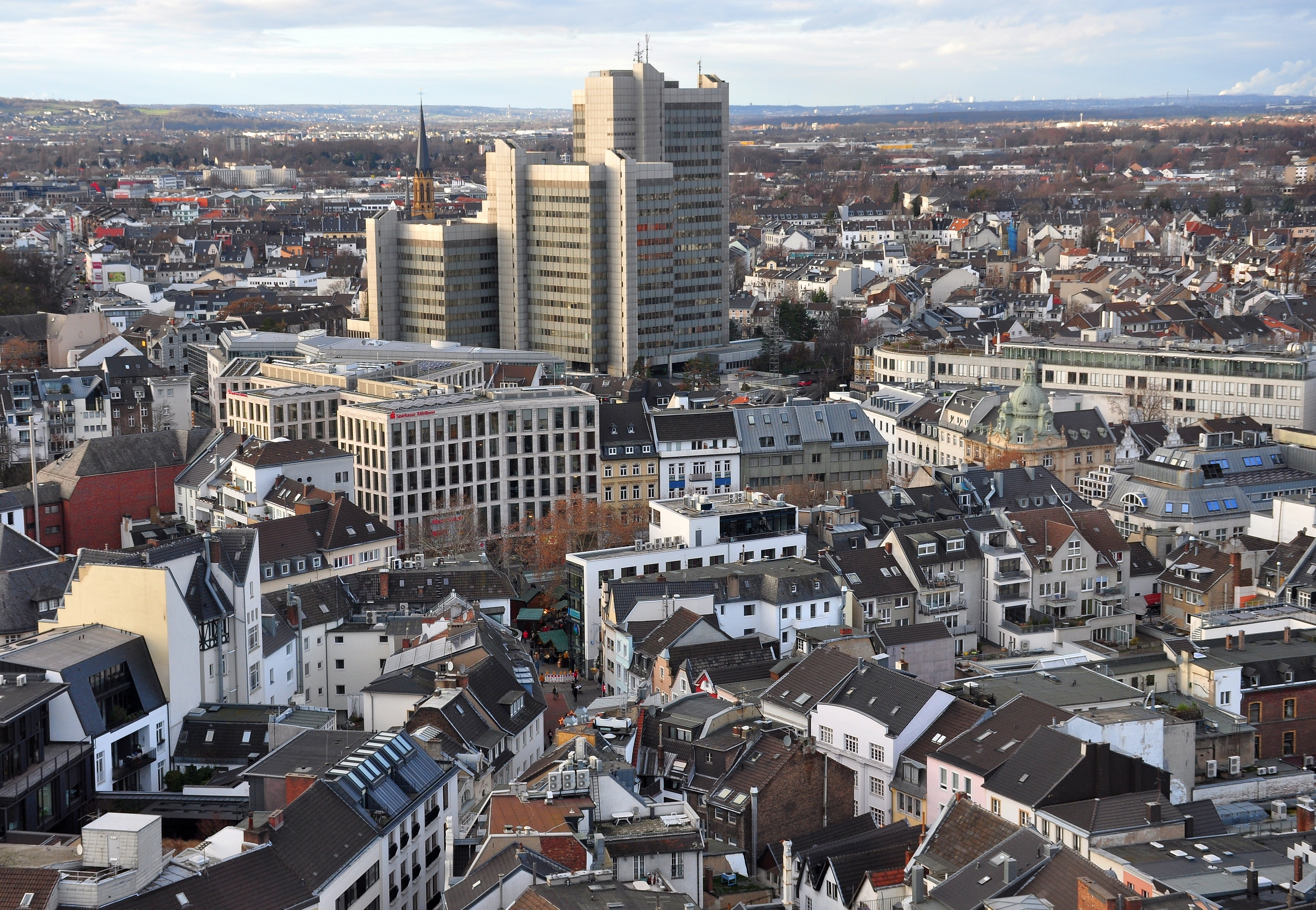 Bonn – Stadthaus 2018